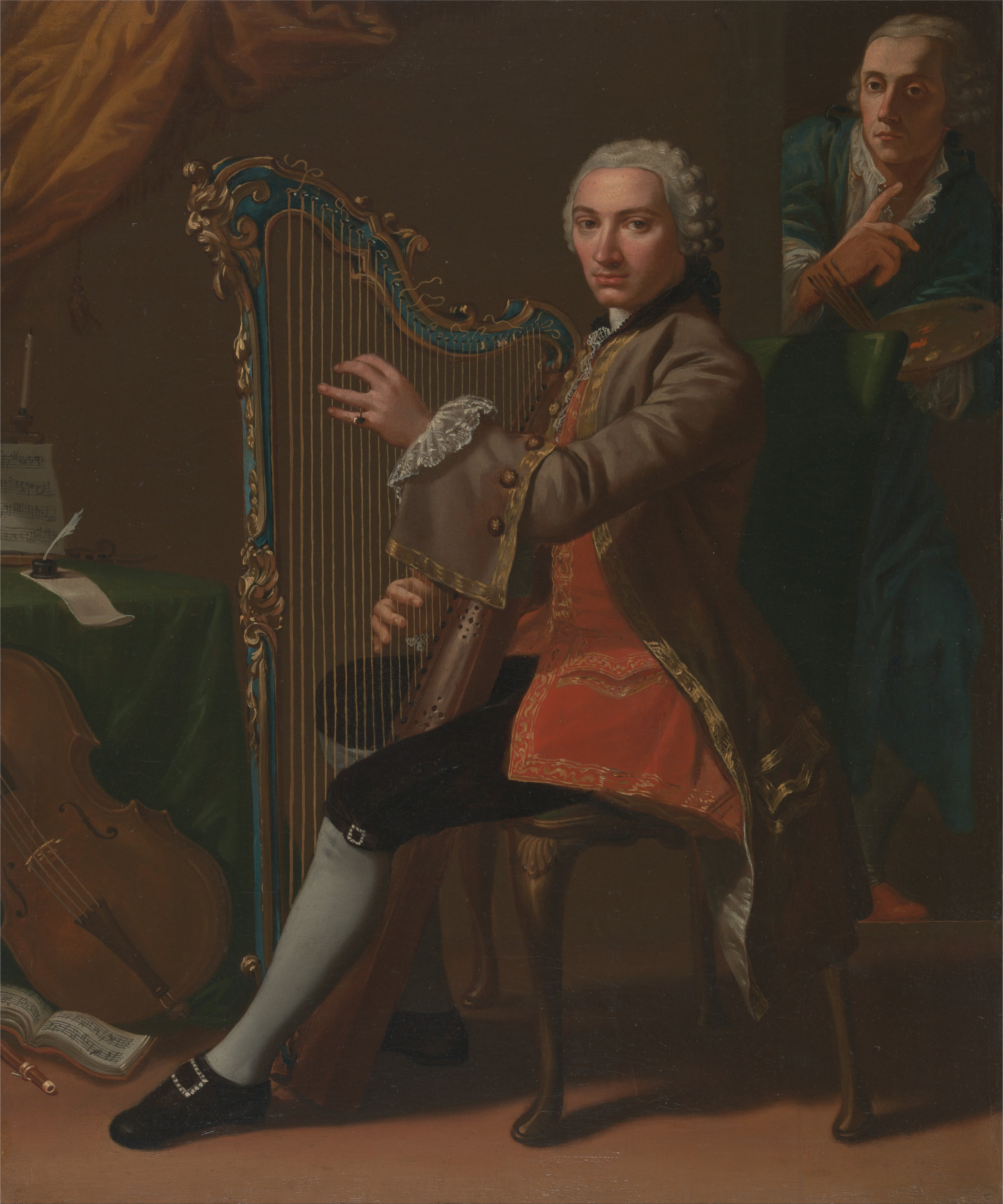 Depicted people: Cristiano Giuseppe Lidarti and Giovanni Battista Tempesti